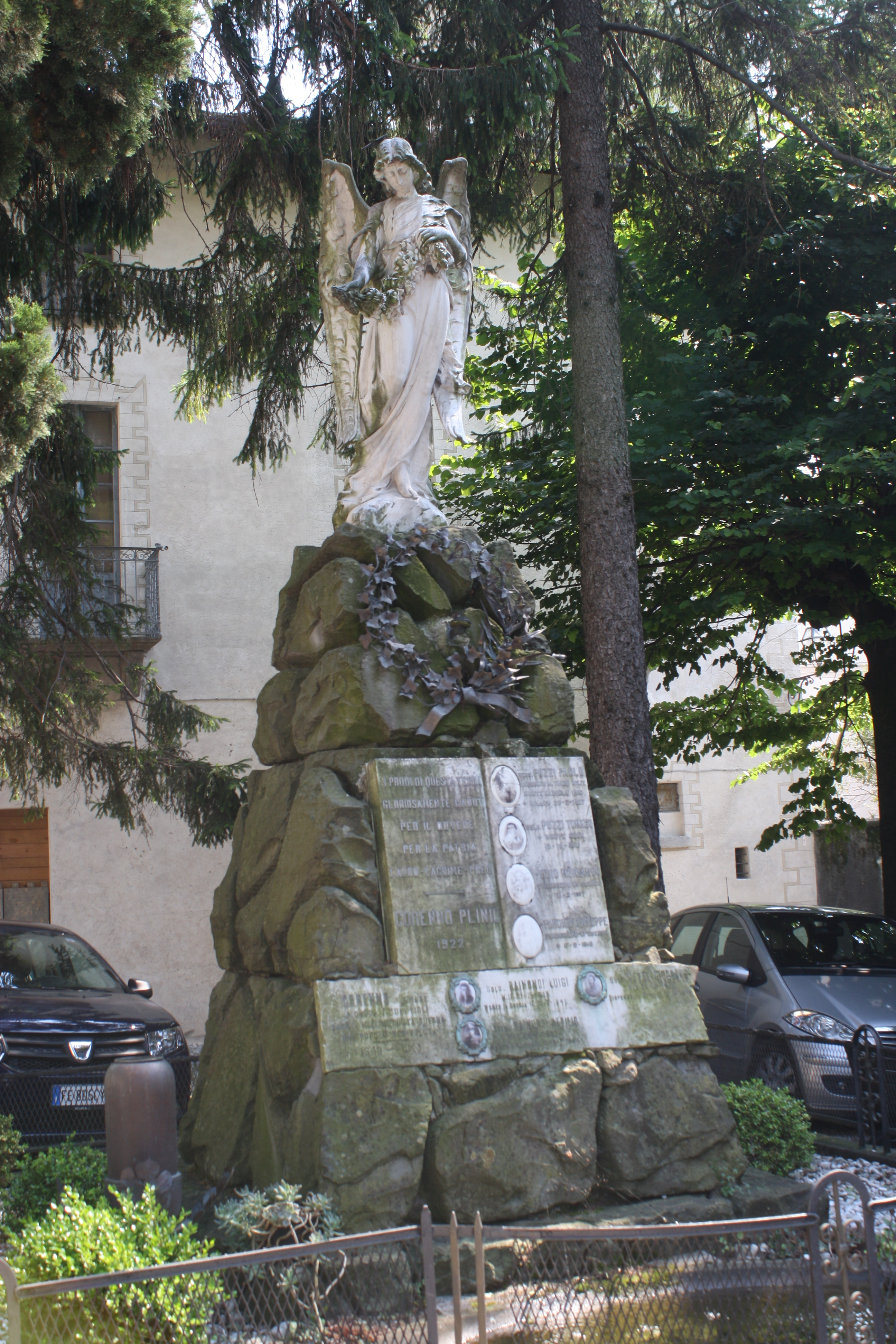 Monumento ai Caduti in piazza Garibaldi a Corenno Plinio (Dervio, provincia di Lecco).